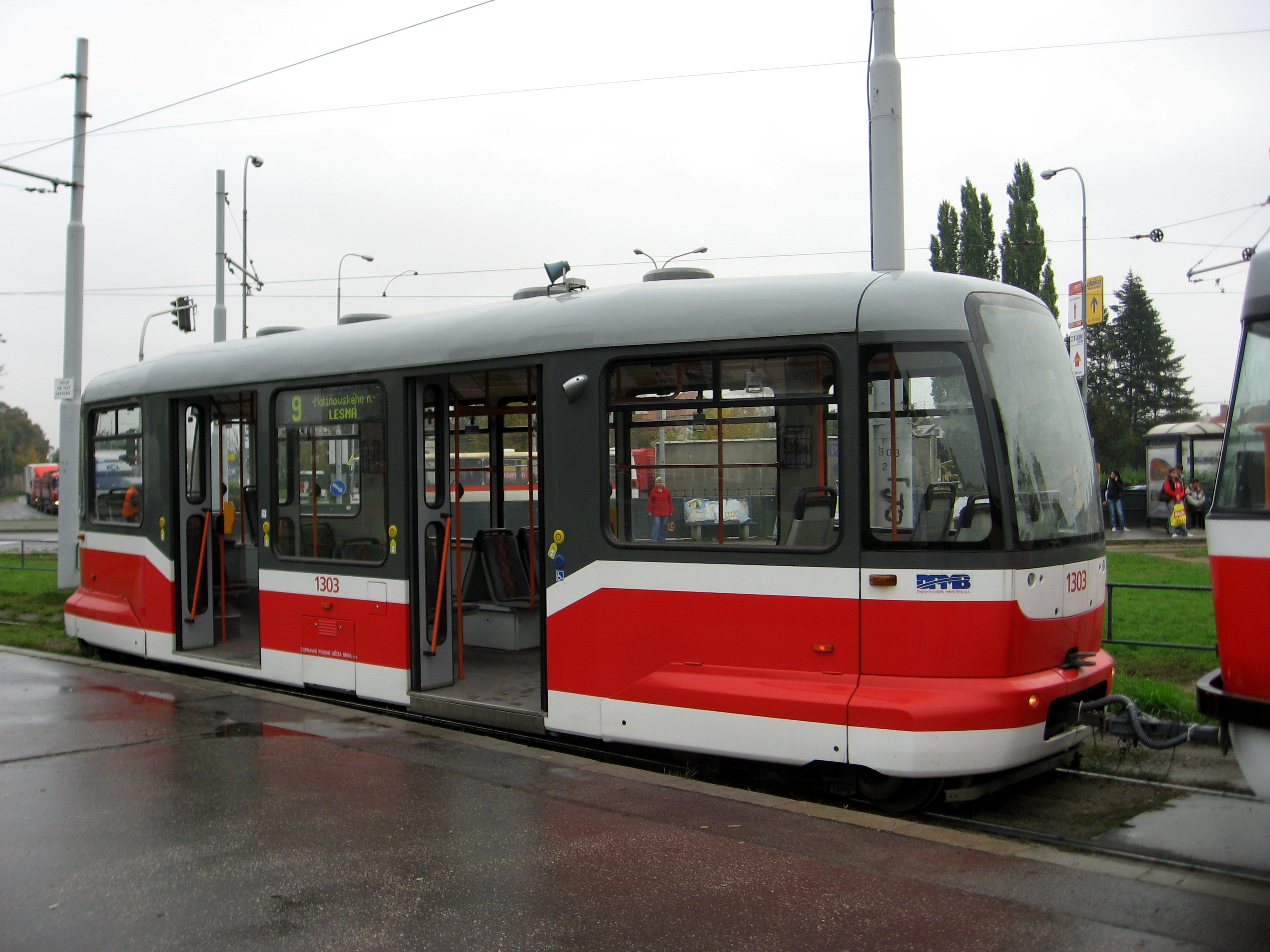 Vlečňák č. 1303